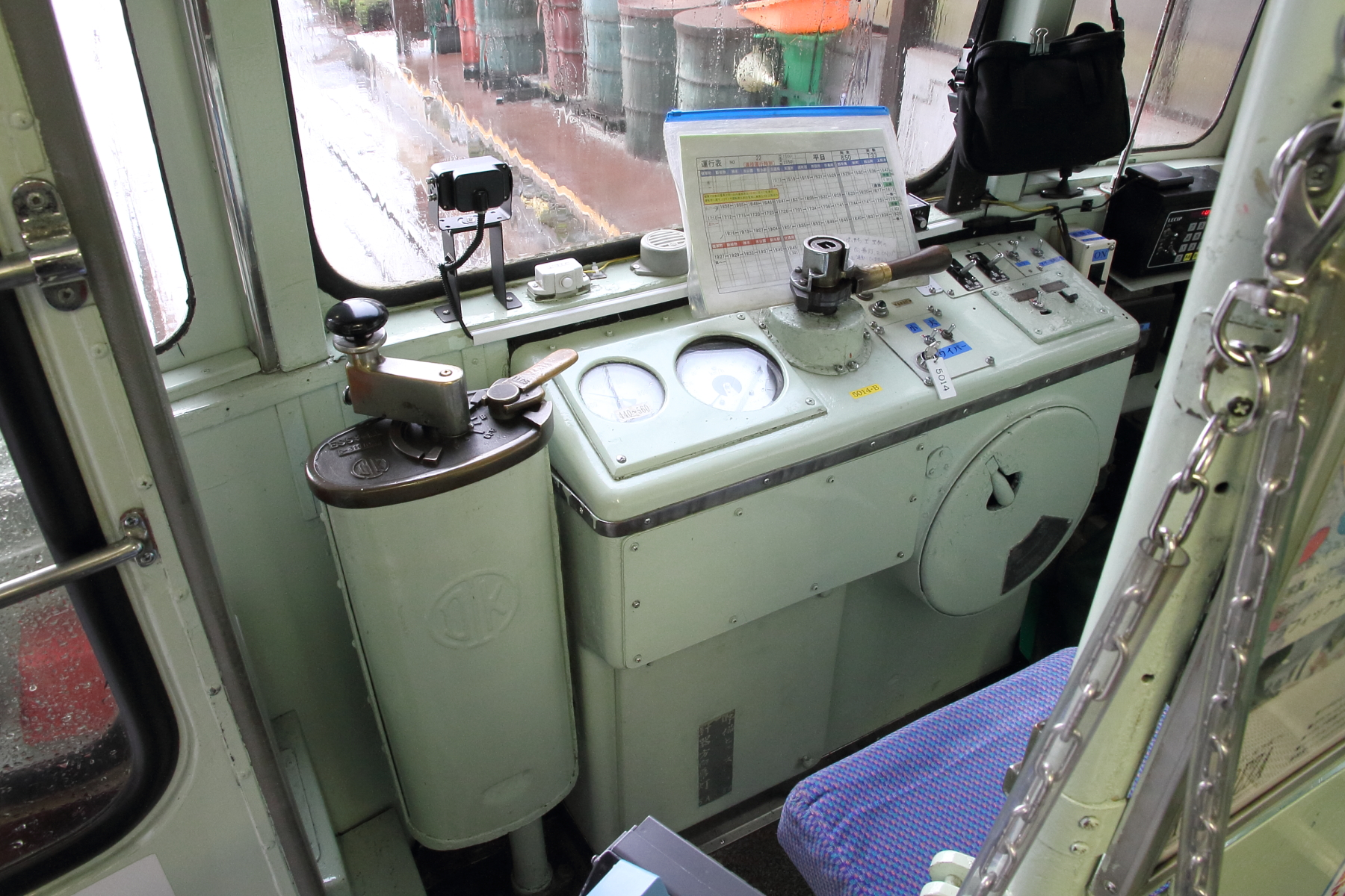 熊本市交通局5000形5014Bの運転台